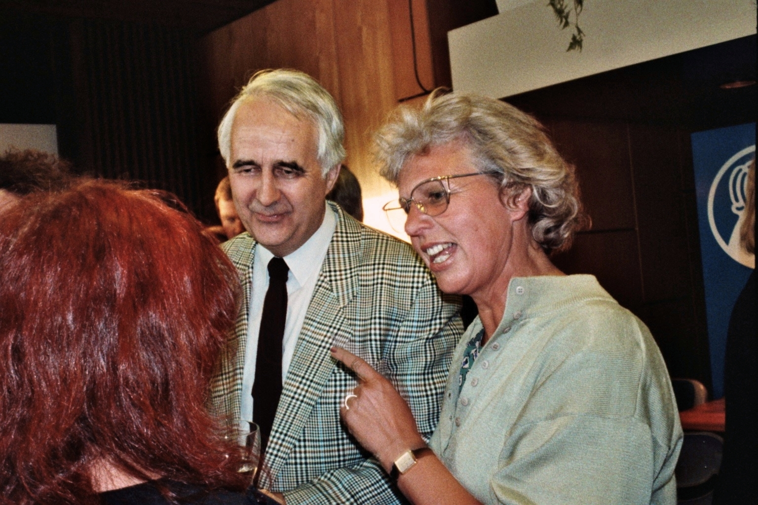 ARD-Korrespondent Heiko Engelkes auf einem NDR-Empfang in Hamburg-Lokstedt